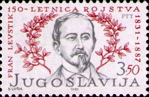 Fran Levstik